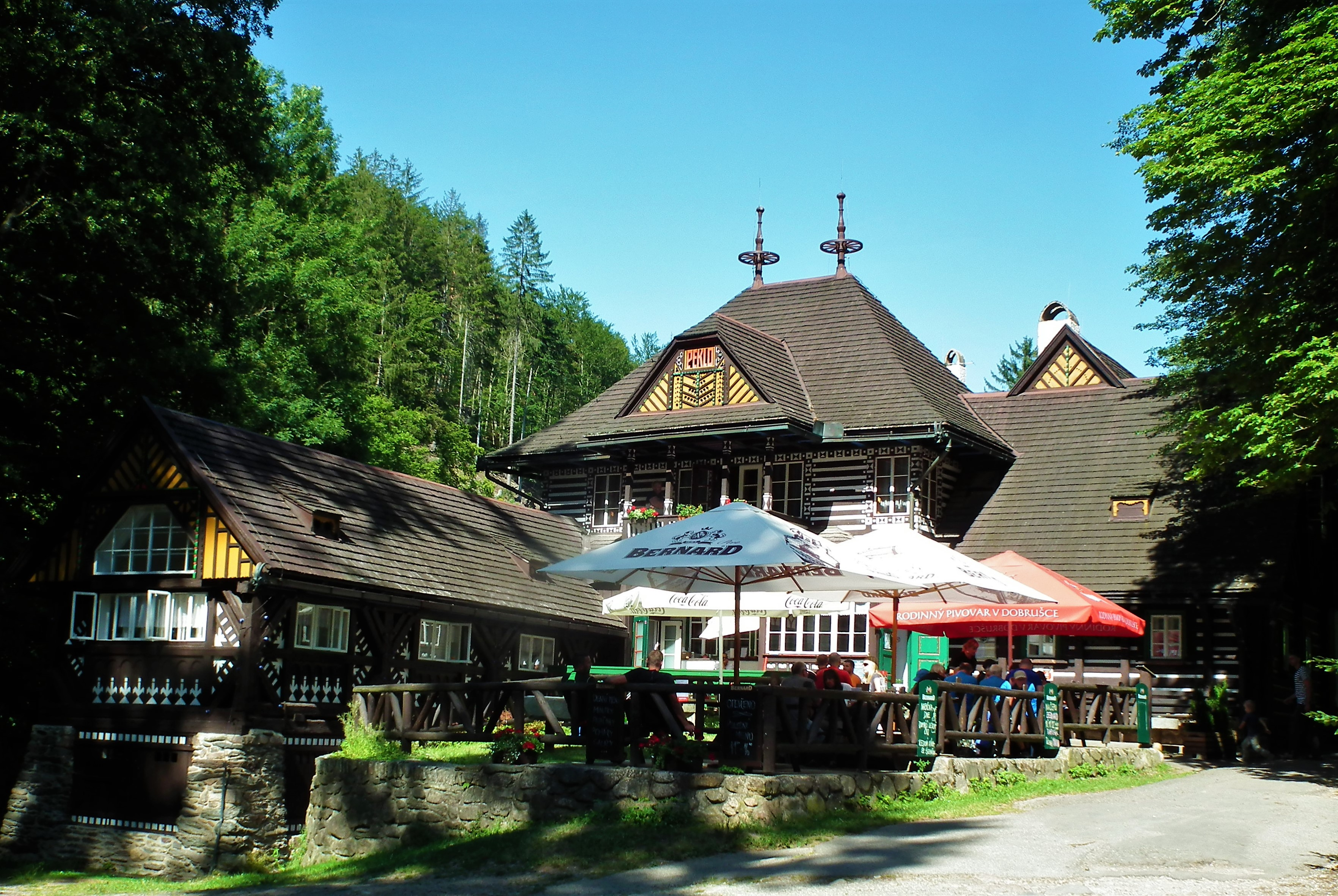 Peklo - chata.